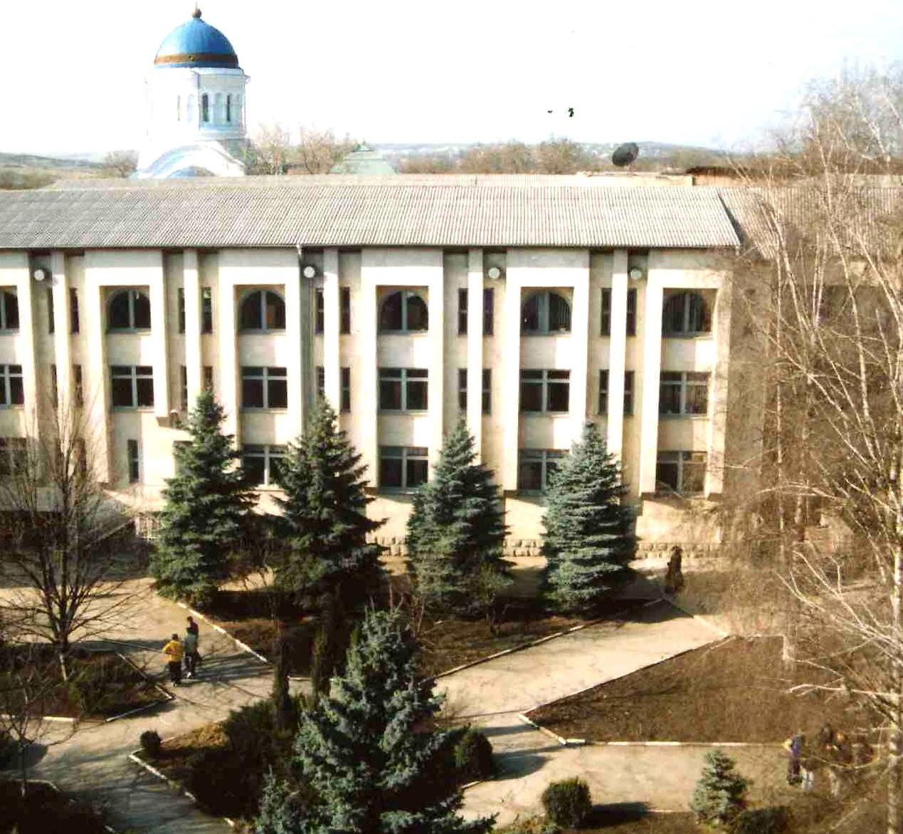 Biblioteca Ştiinţifică Universitară din Bălţi